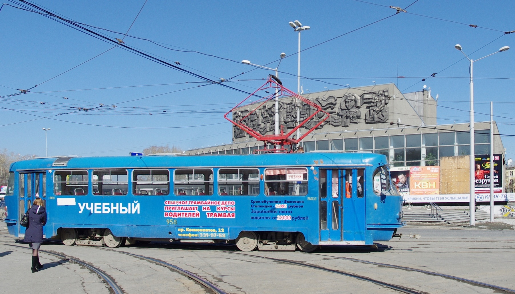 Учебный трамвай на фоне Дворца молодёжи по проспекту Ленина, 1